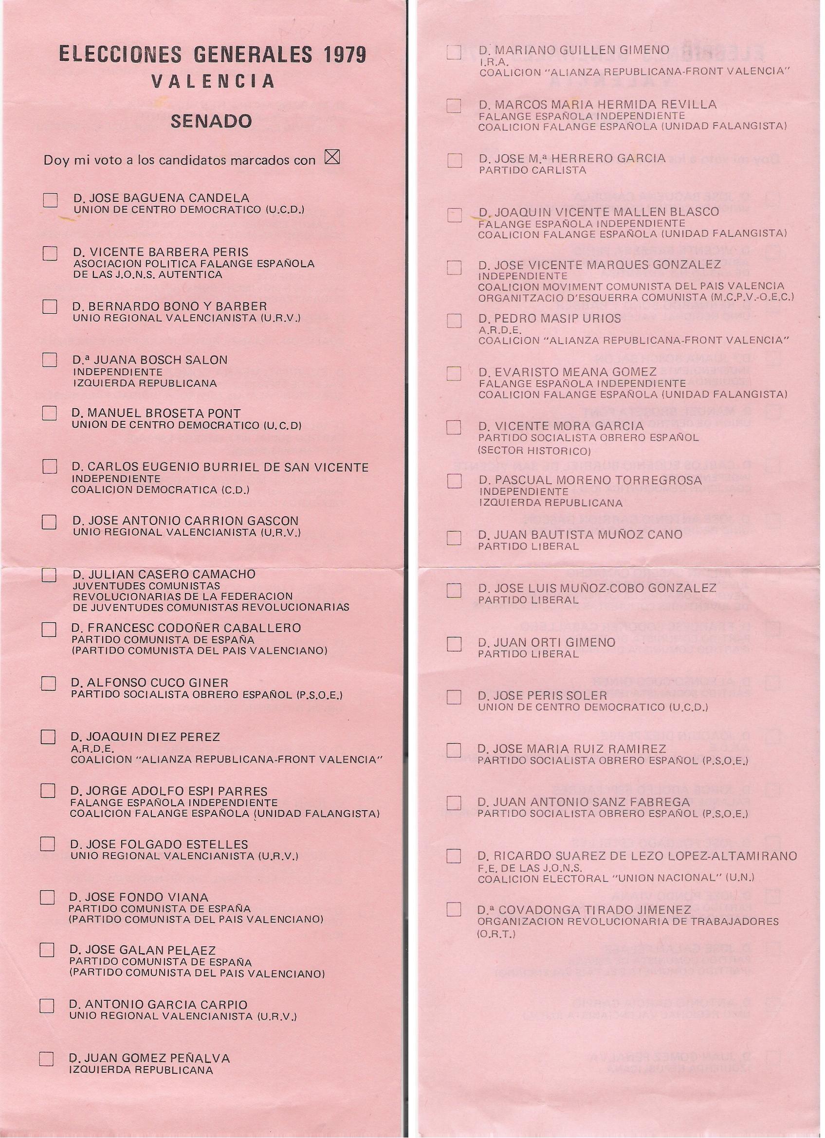 Papeleta electoral para el Senado en Valencia, 1979. Son las dos caras del documento, que está impreso por ambos lados.